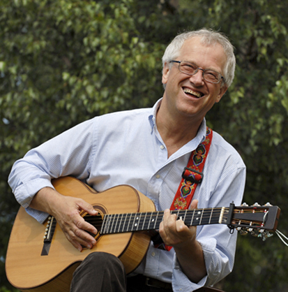 Tore Magnus Pettersson